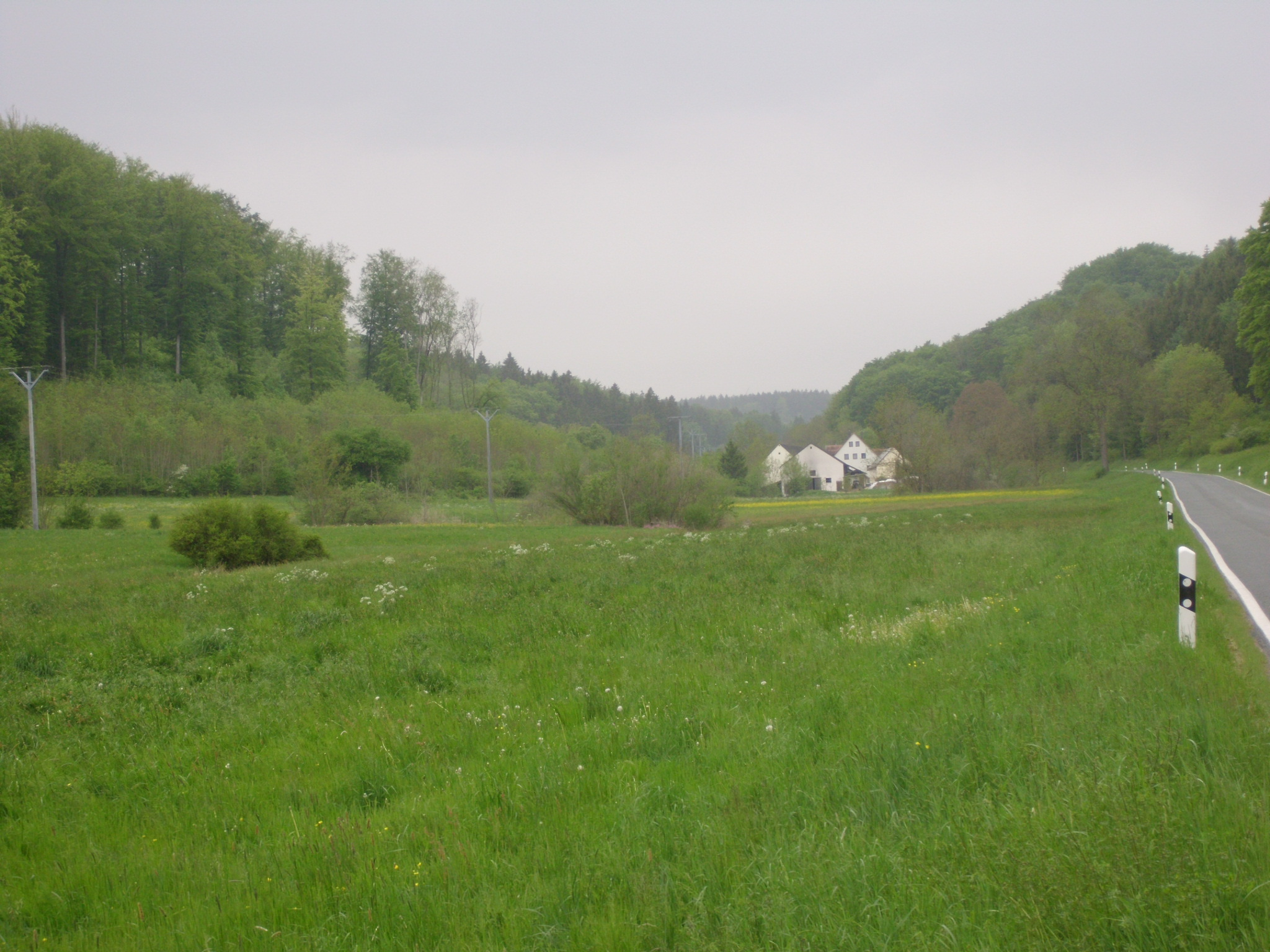 Fuchsmühle im Rohrachtal, Ortsteil von Heidenheim (Mittelfranken) im Landkreis Weißenburg-Gunzenhausen